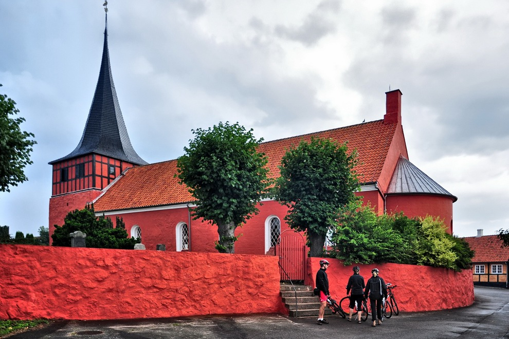 Svaneke Church on Bornholm, Denmark